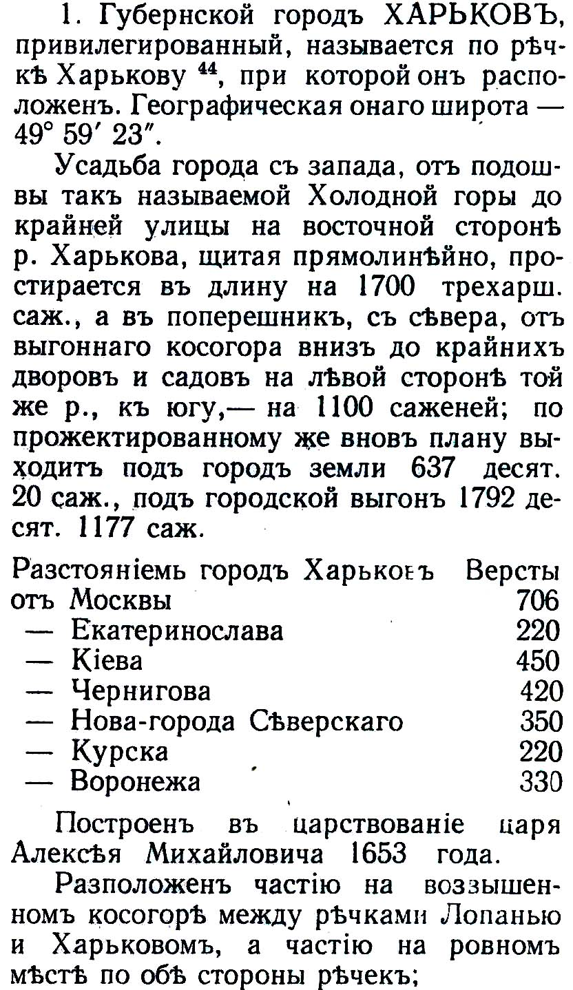 В "Топографическом описании Харьковского наместничества" 1788 года первый город в разделе "О городах" (без Харько). Происхождение названия города Харьков.